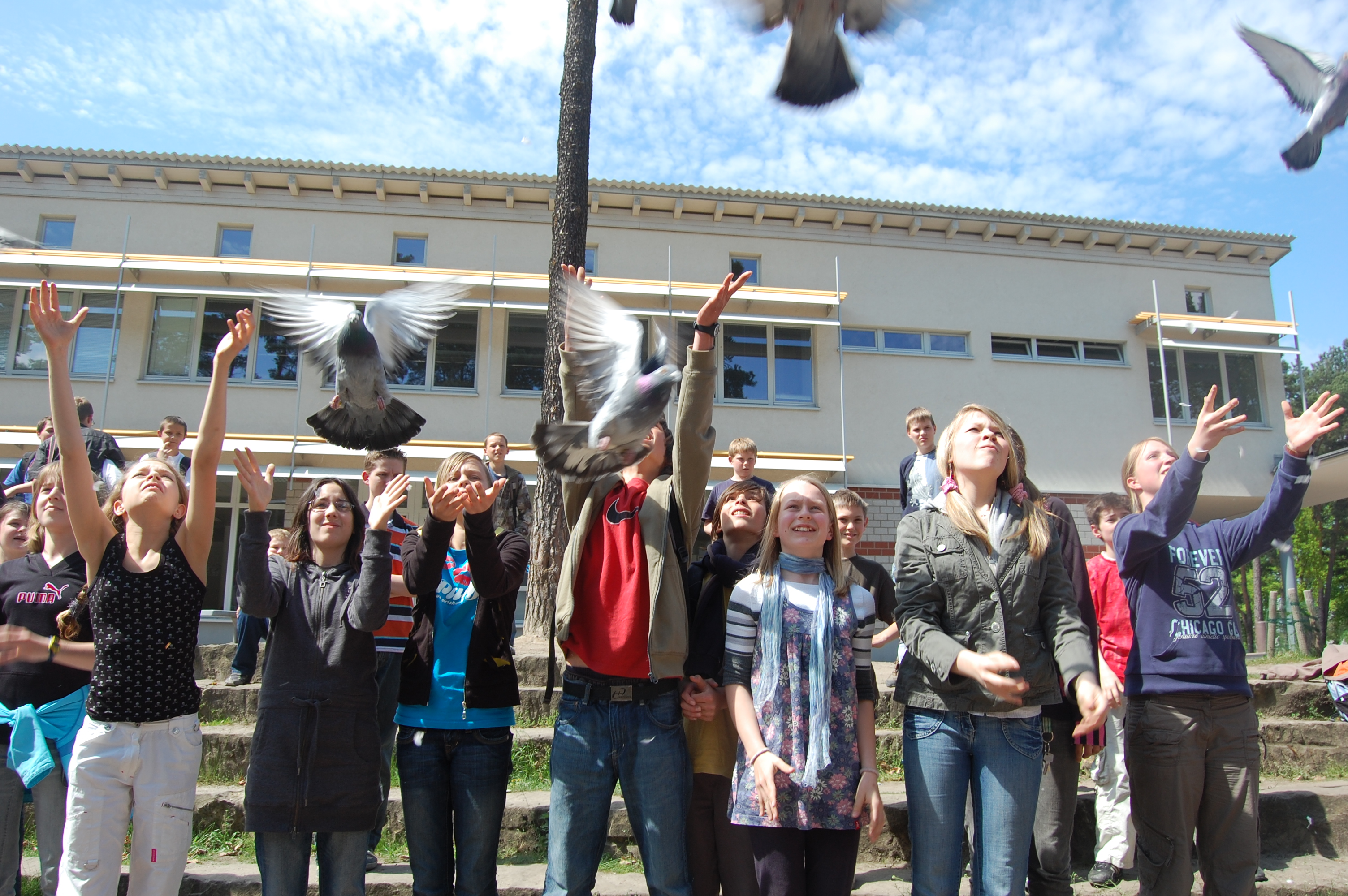 Die 6. Klassen der Waldgrundschule lassen zum Abschluss des Projettags zum Thema "Frieden" auf dem Schulhof Tauben in die Luft steigen.